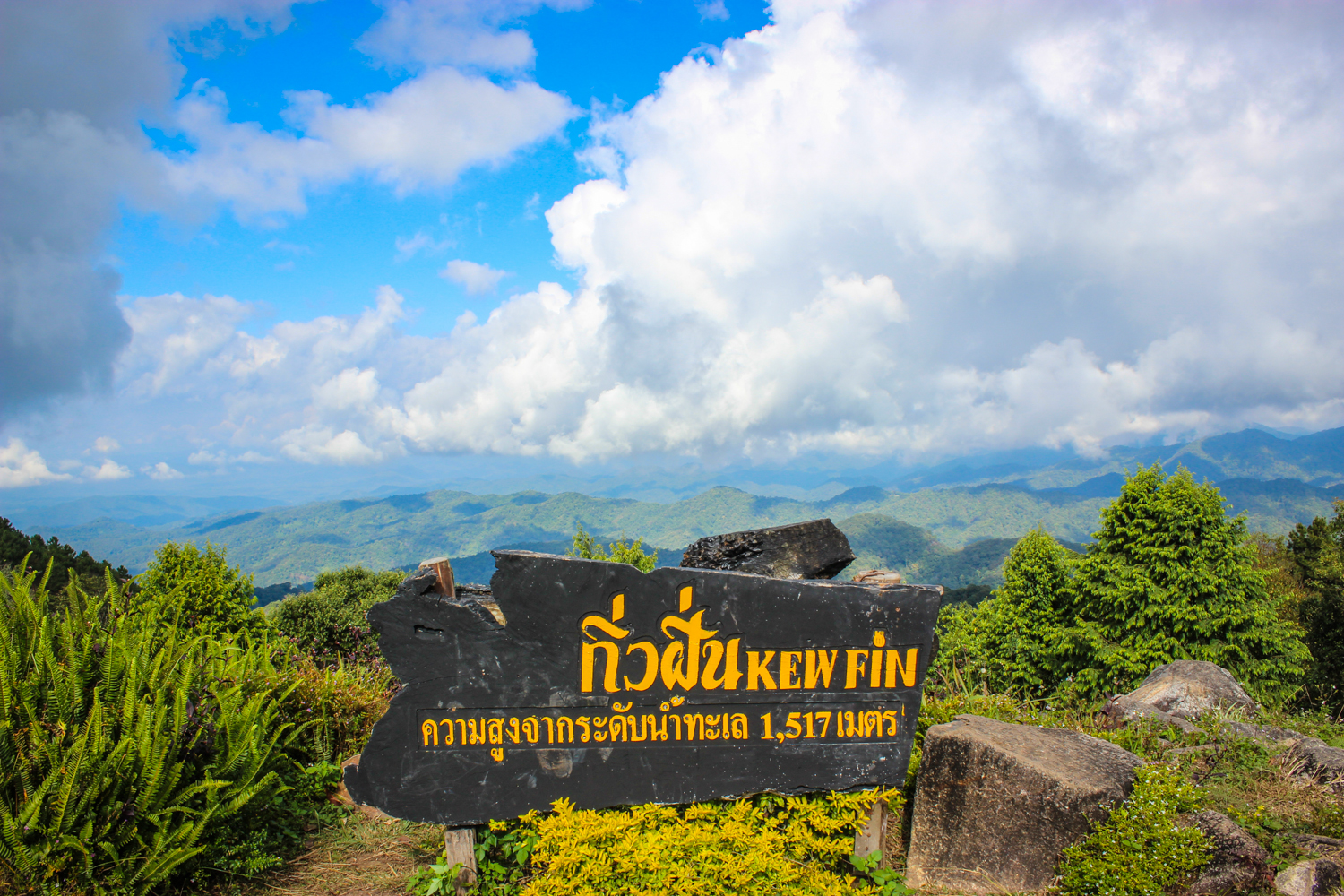 อุทยานแห่งชาติแจ้ซ้อน